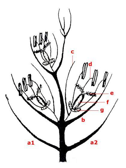 Schéma d'épillet de poacée, repris à partir d'un dessin de la version tchèque de Wikipédia.